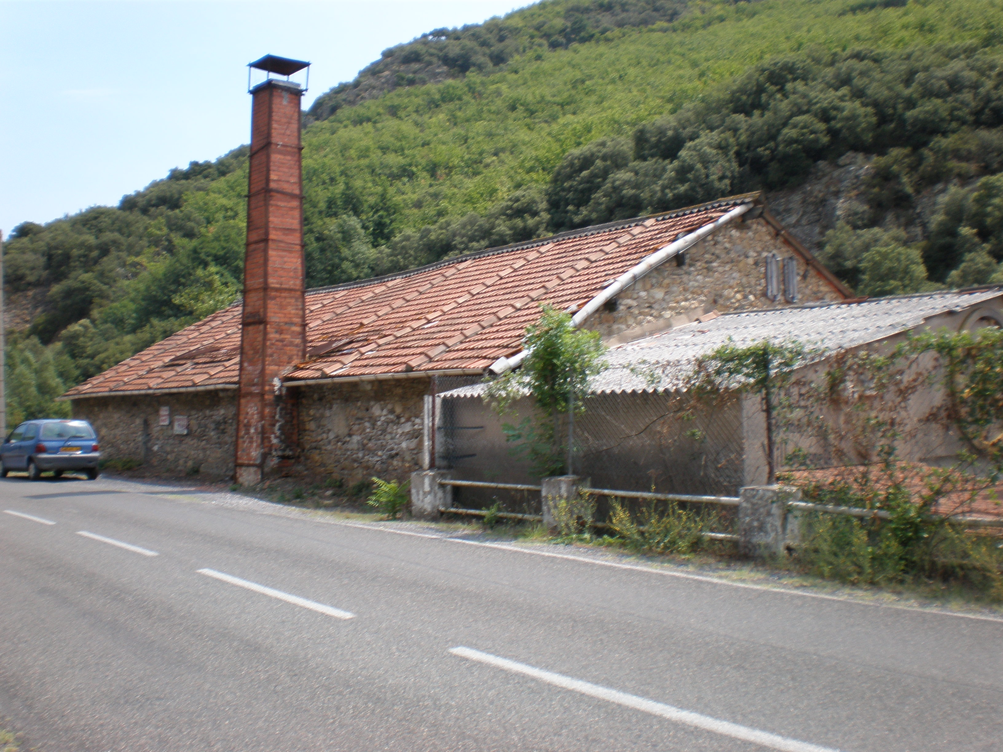 L'ancienne fonderie de cloches Granier à Castanet-le-Bas (commune de Saint-Gervais-sur-Mare, Hérault, 34).